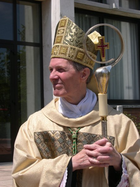 Renato Corti, vescovo di Novara